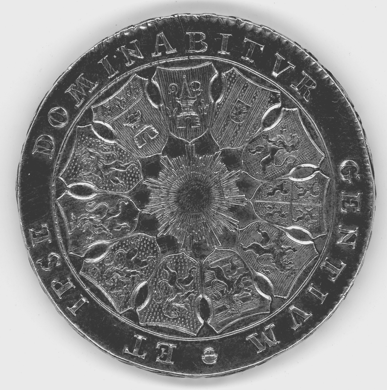 Monnaie des Etats belgiques unis ET IPSE DOMINATIBVR GENTIVM - Révolution brabançonne de 1790 - les 11 provinces